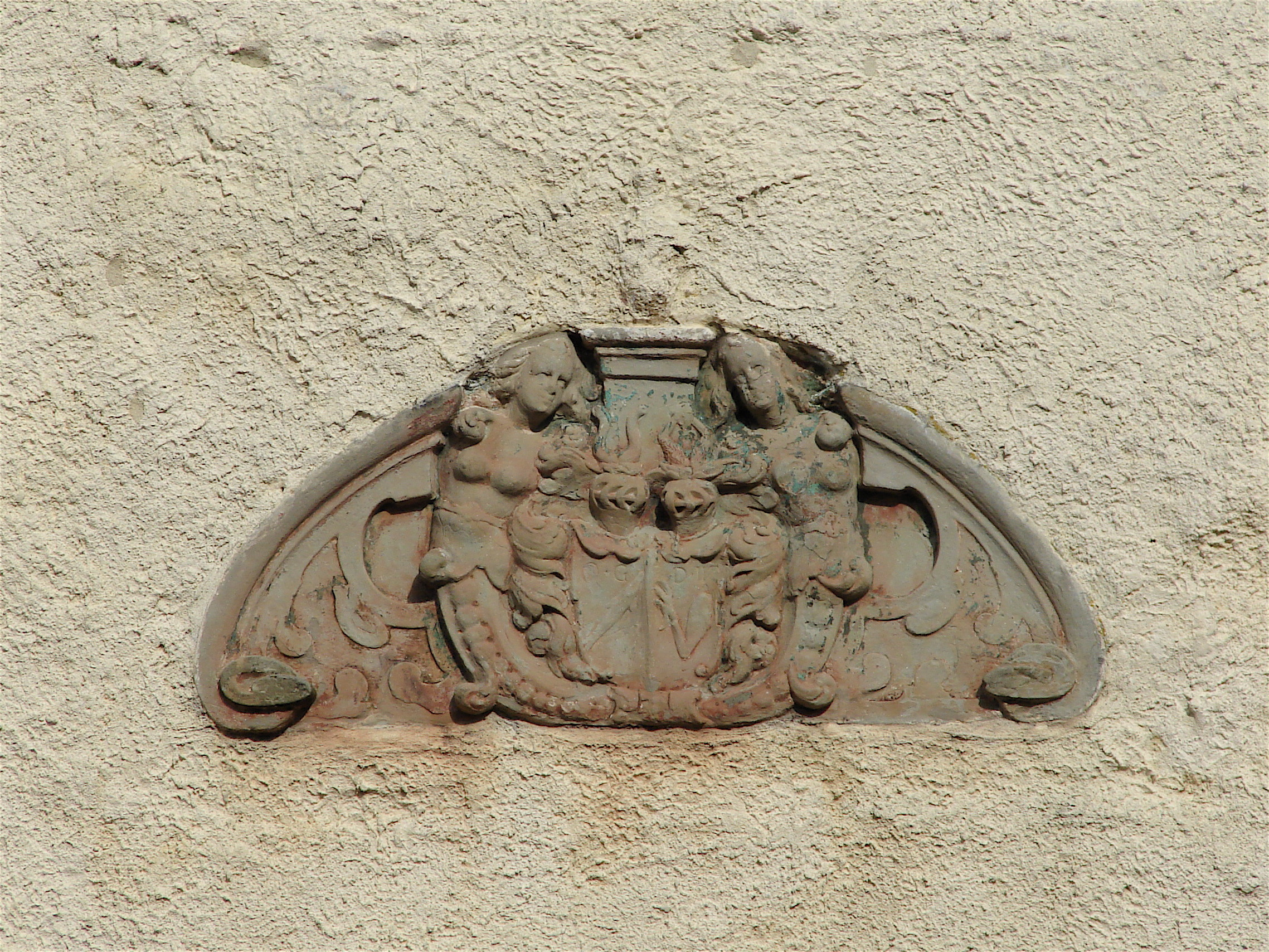 Ove Gjeddes våbentavle på Tommerup, Tommarp Kungsgård, Sverige